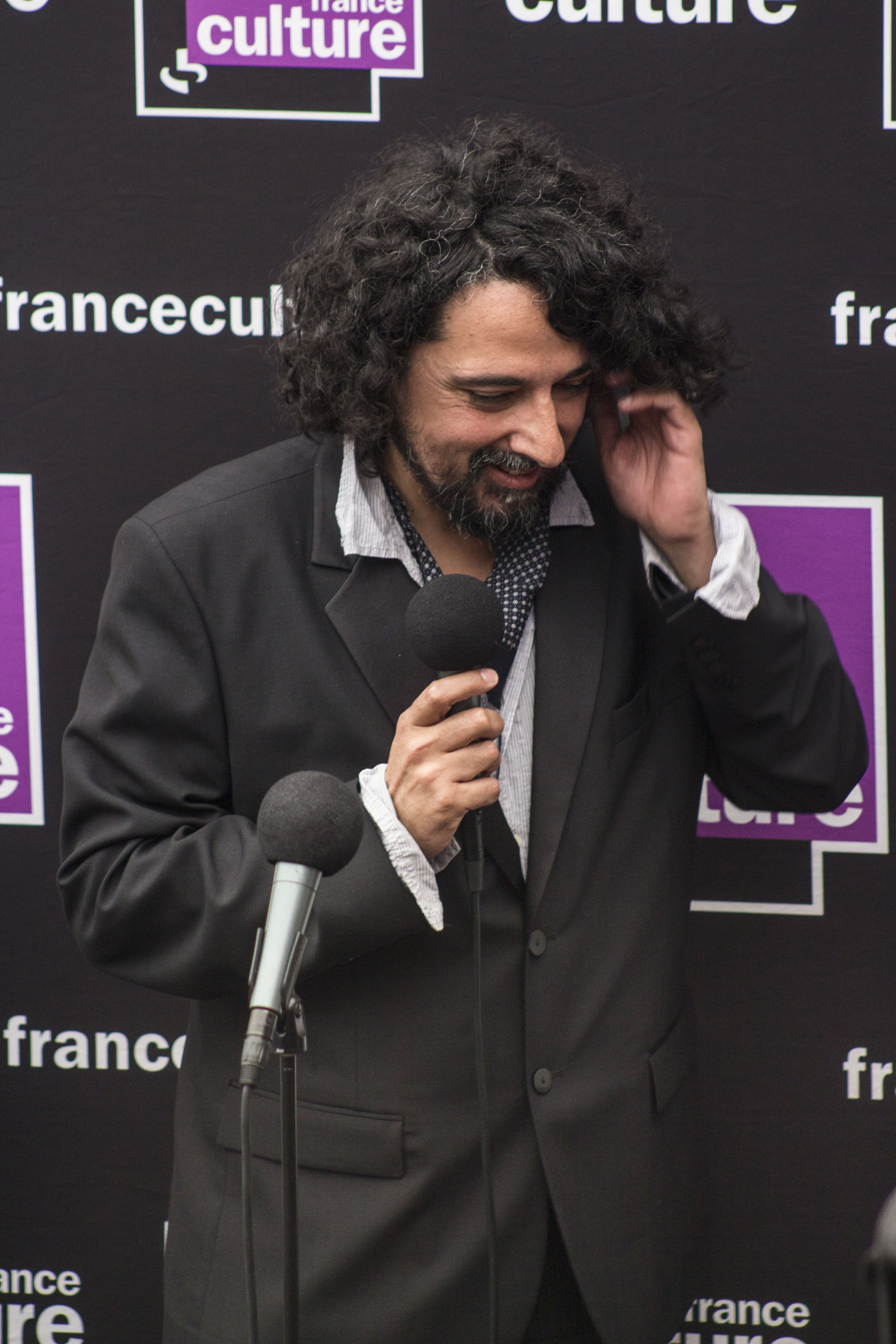 Bertrand Mandico à la cérémonie de remise du prix France Culture cinéma des étudiants à Cannes, le 13 mai 2018